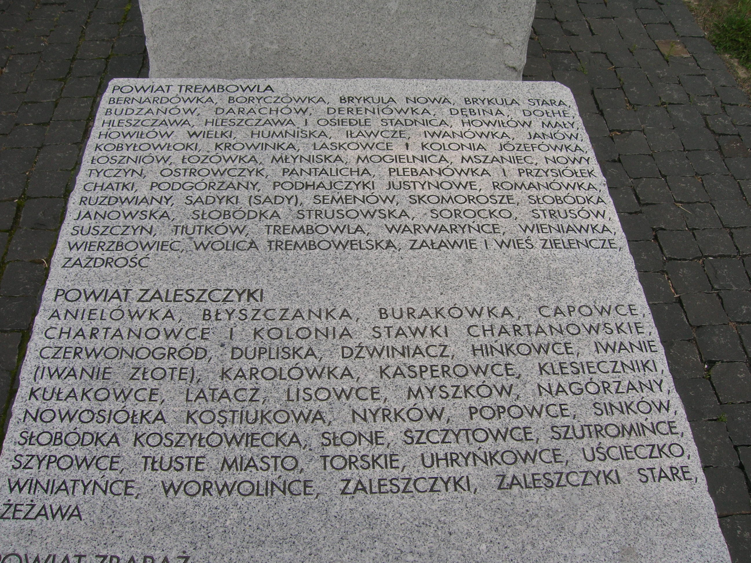 tablica powiaty Trembowla i Zaleszczyki